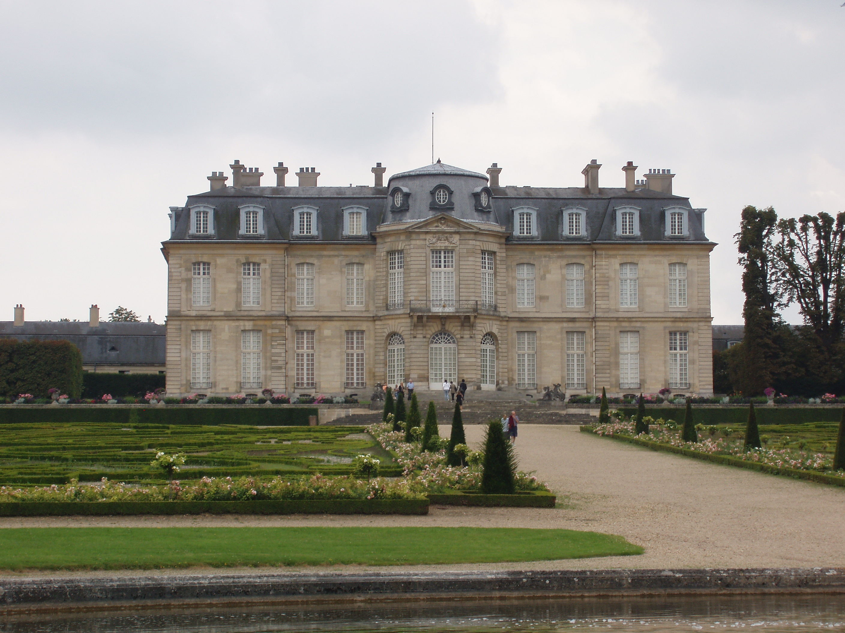 Vue du château de Champs-sur-Marne en Seine-et-Marne en France du côté du parc.